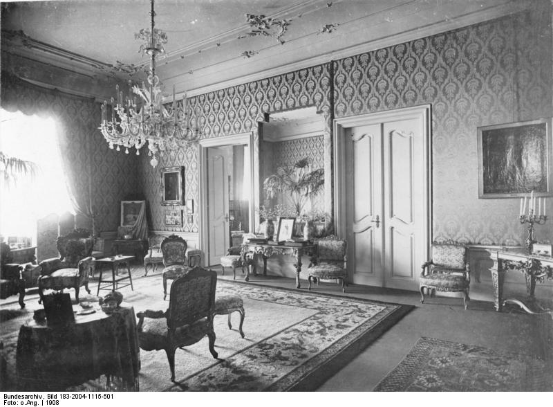 Scherl: Das deutsche Botschafterpalais in Wien. Der Empfangssalon; 1908 9140-08